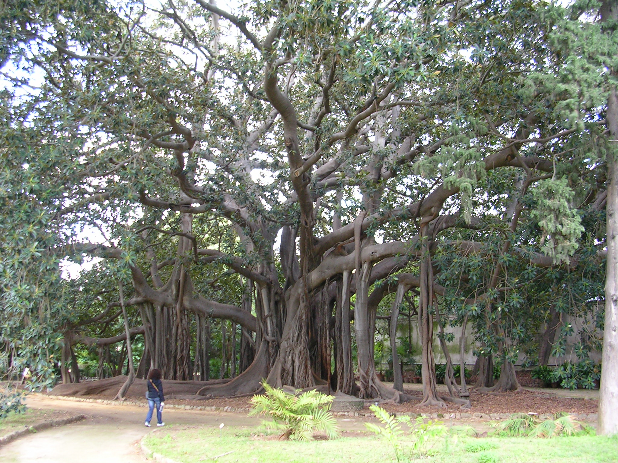 Ficus macrophylla - Orto botanico di Palermo - Sicily - Italy